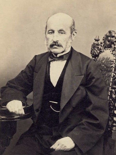 Petrache Poenaru, portret aşezat